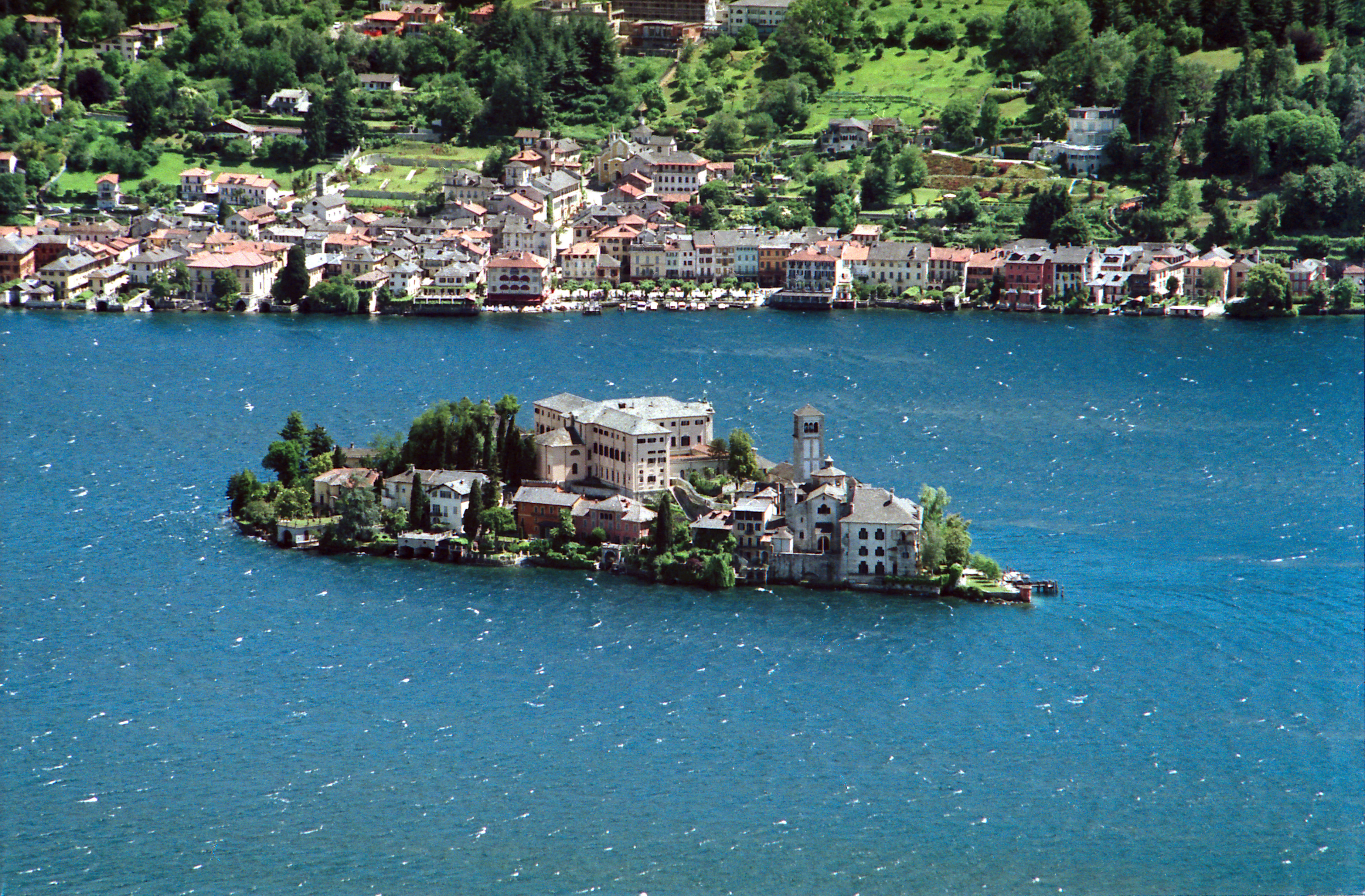 Isola Orta San Giulio ITALY